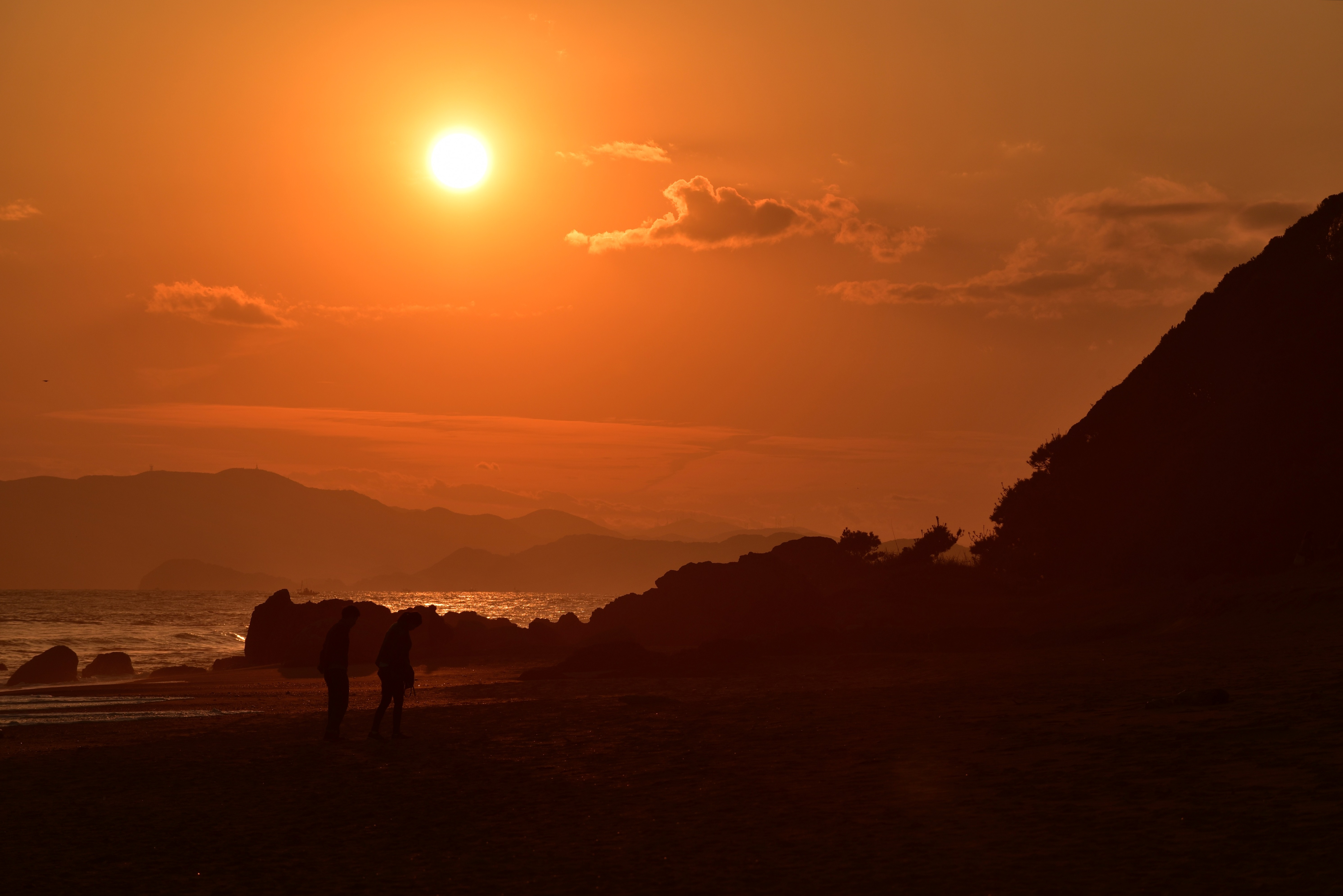 恋路ヶ浜の夕景 Nikon D750